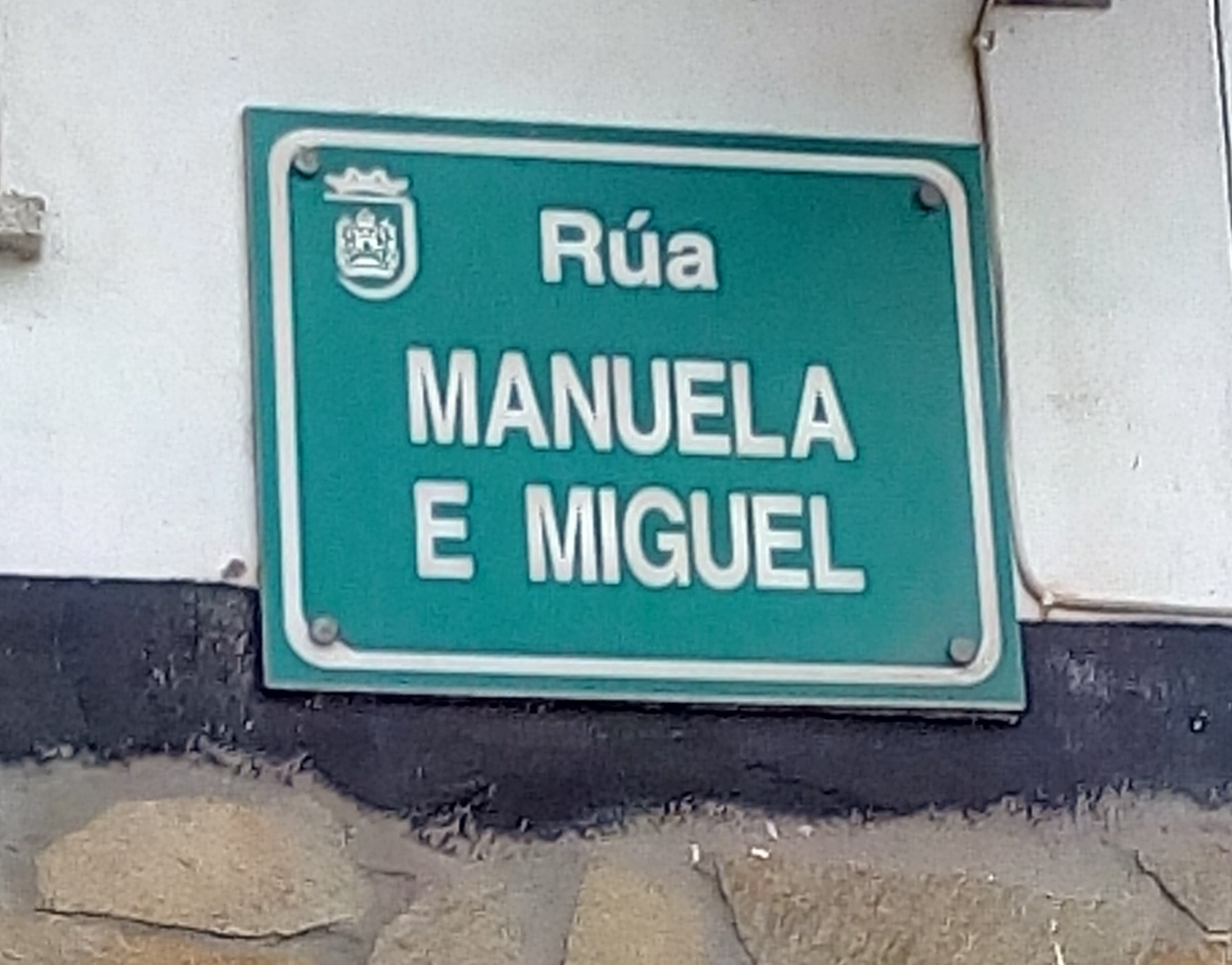 placa calle en Ferrol